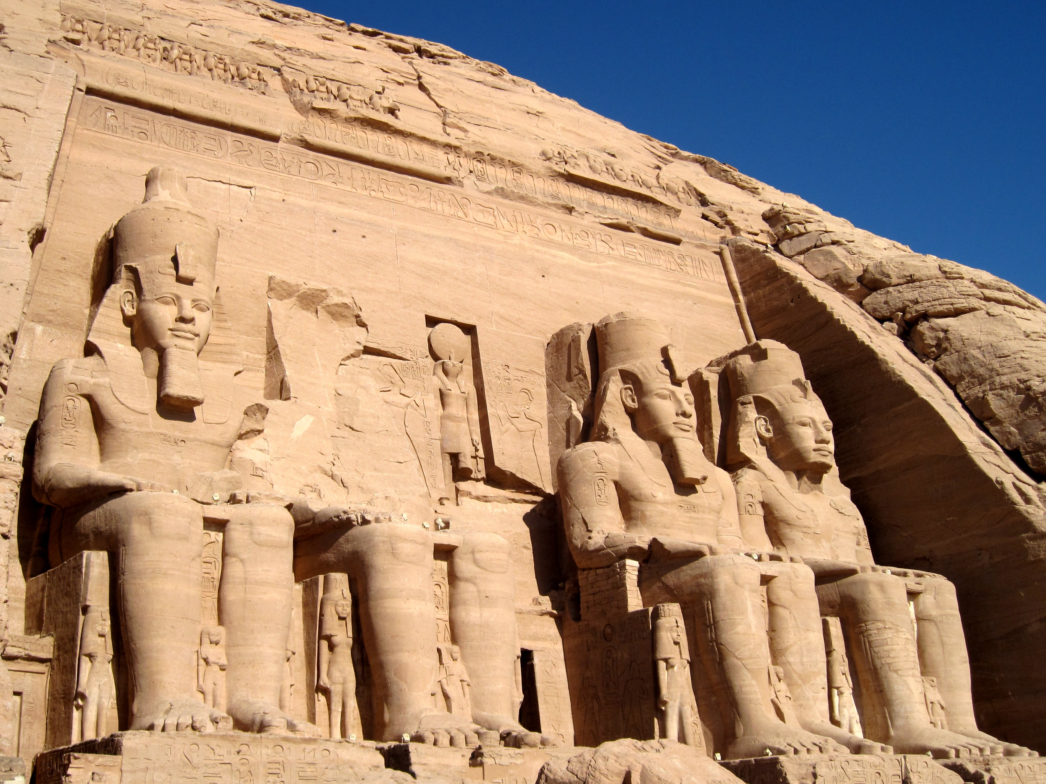 Großer Tempel von Abu Simbel, Ägypten